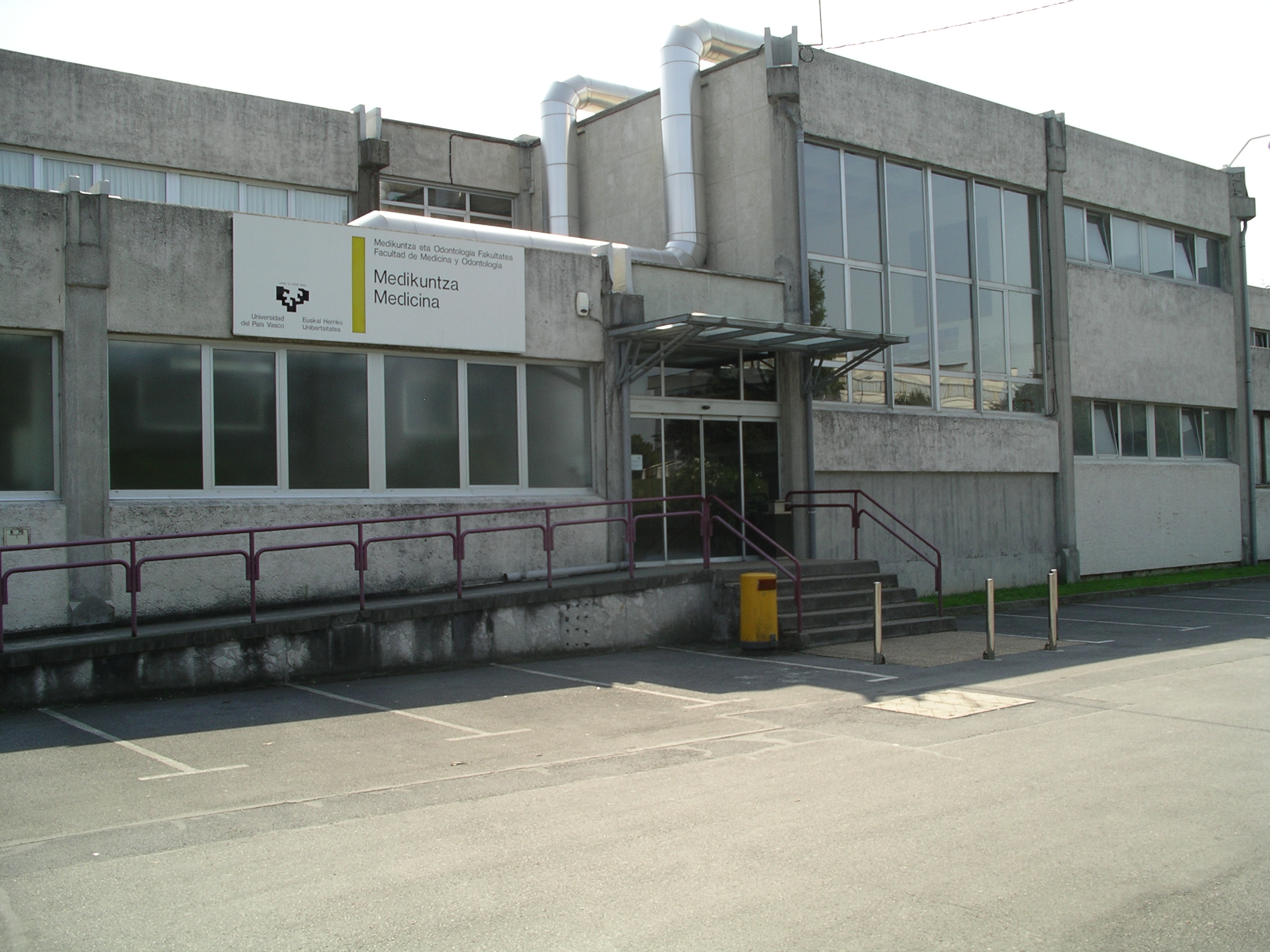 Medikuntza eta Odontologia Fakultatea, Bizkaiko Campusa, Leioa-Erandio, Euskal Herriko Unibertsitatea.